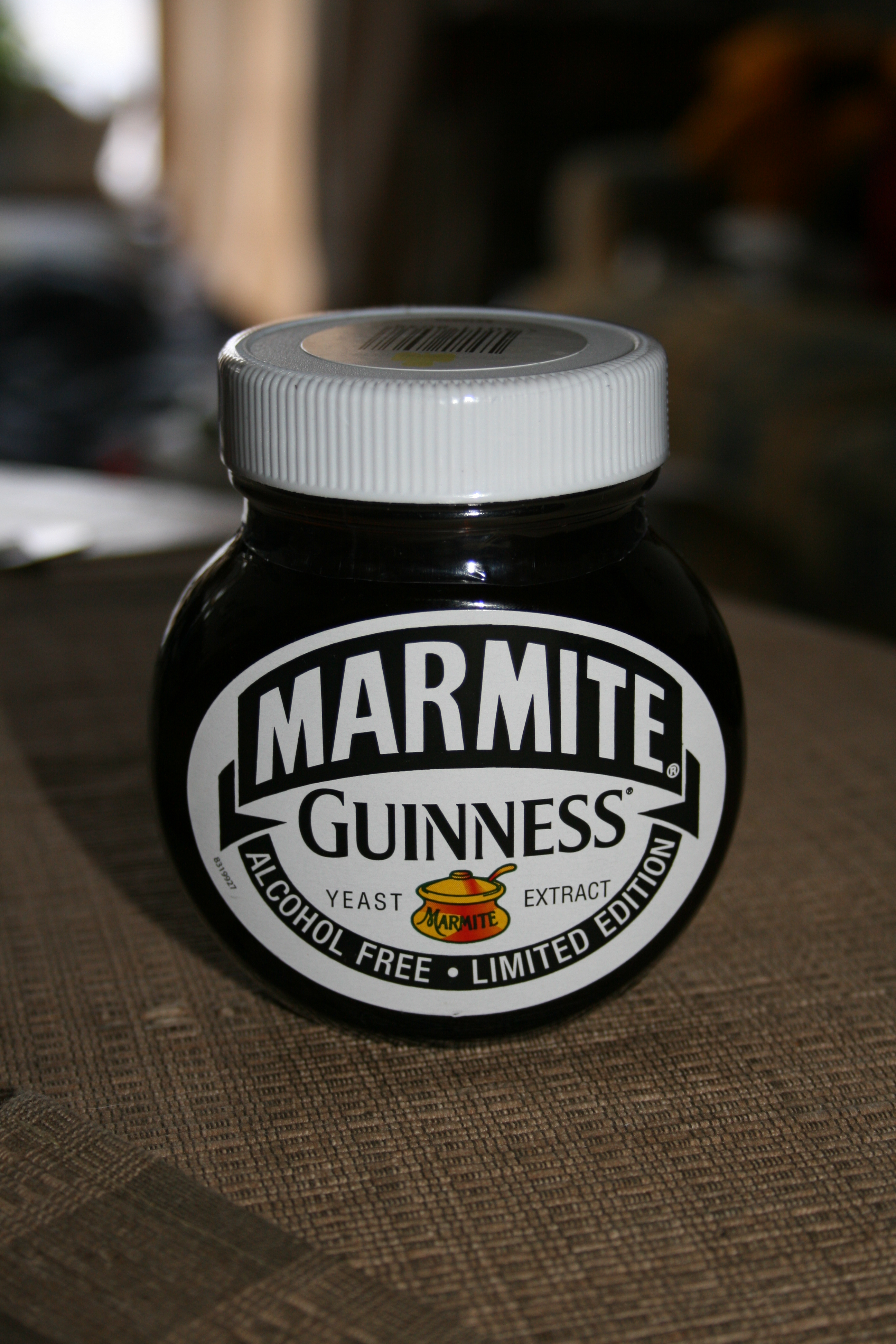 Marmite Guinness Edition